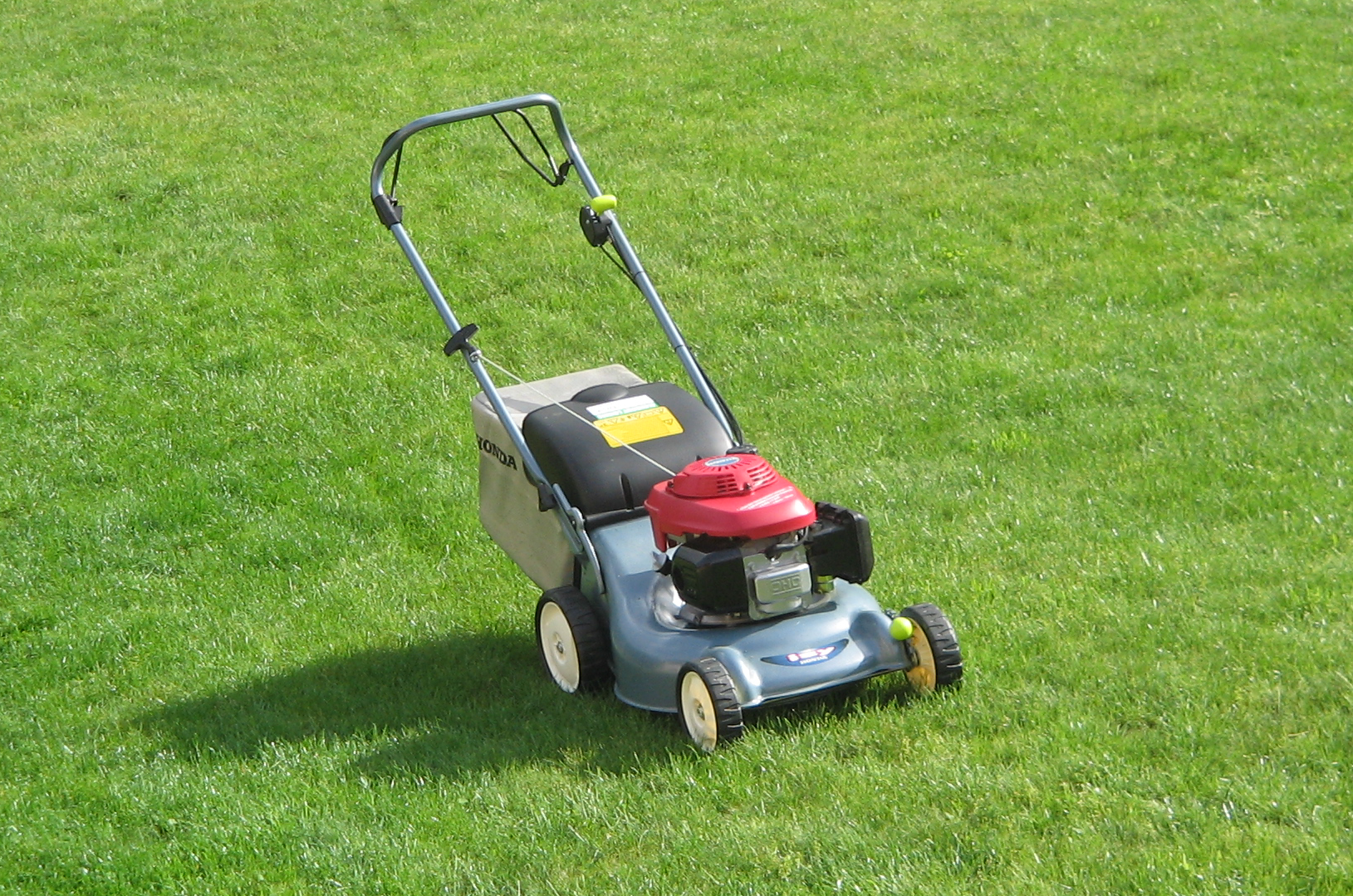 Photo d'une tondeuse a gazon